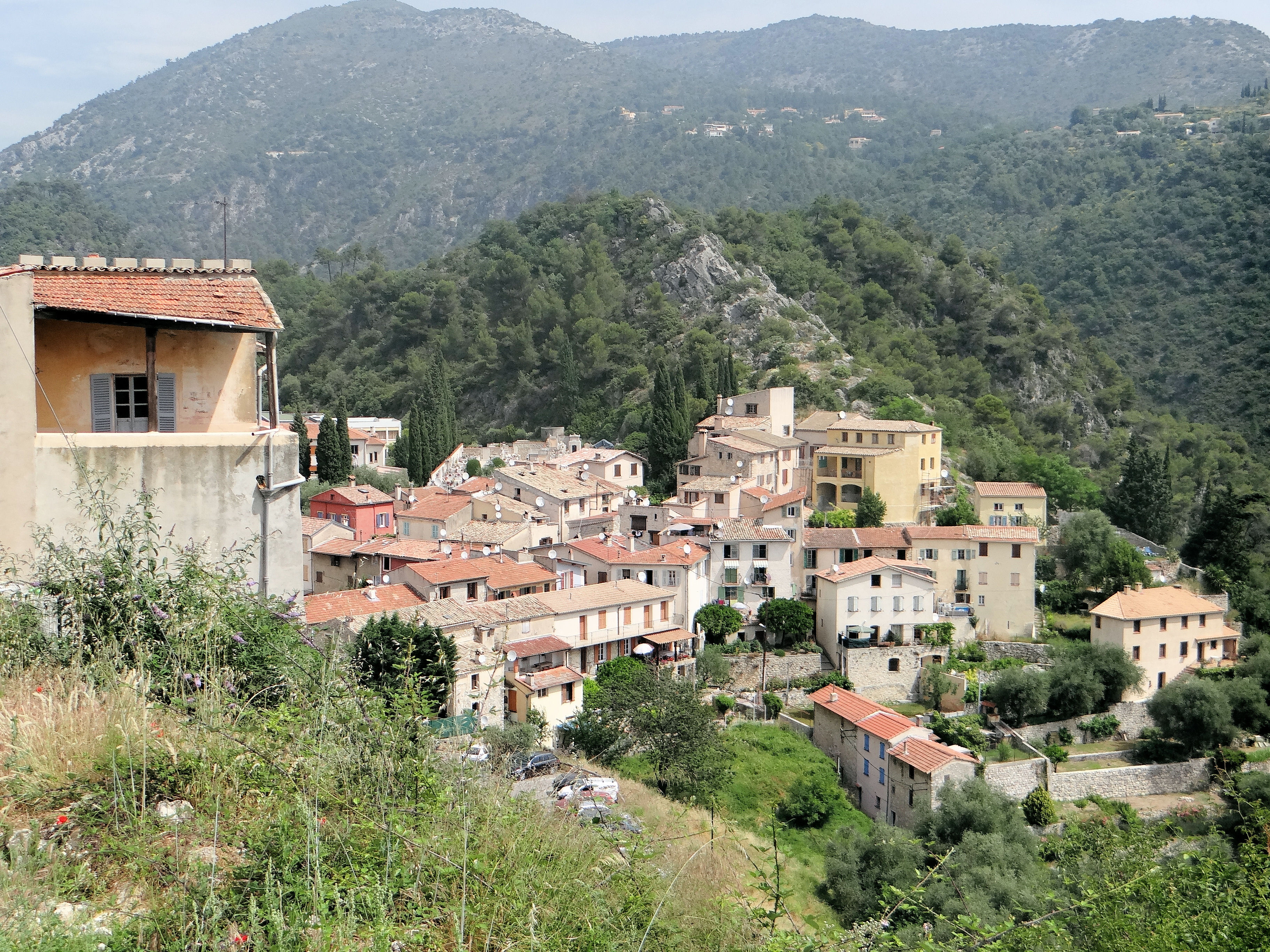 Tourrette-Levens - Vue de la ville depuis le château - Partie est